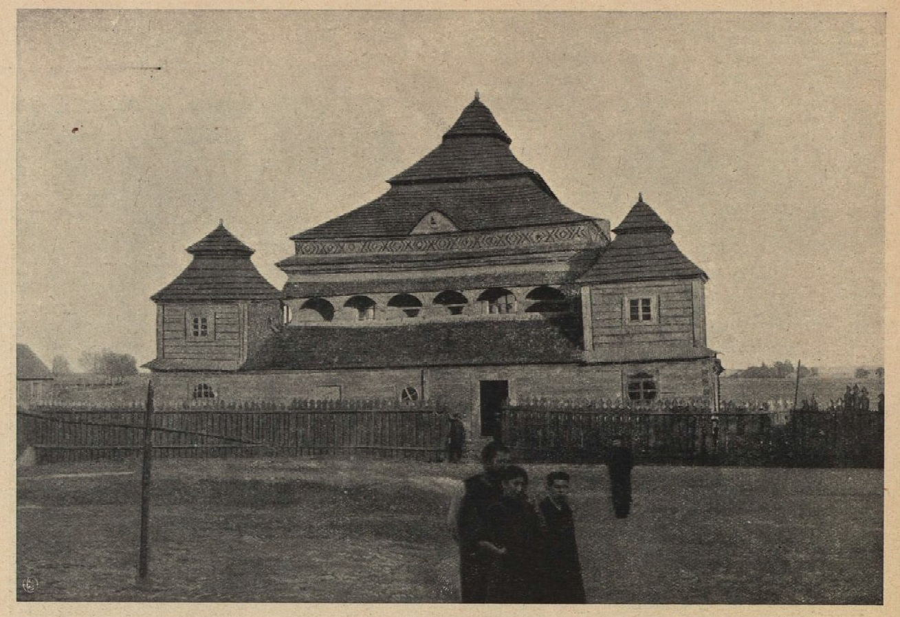 Materiały z wystawy Architektury Polskiej, urządzonej w 1915 r. staraniem Koła Architektów i Towarzystwa Opieki nad Zabytkami Przeszłości w Warszawie.